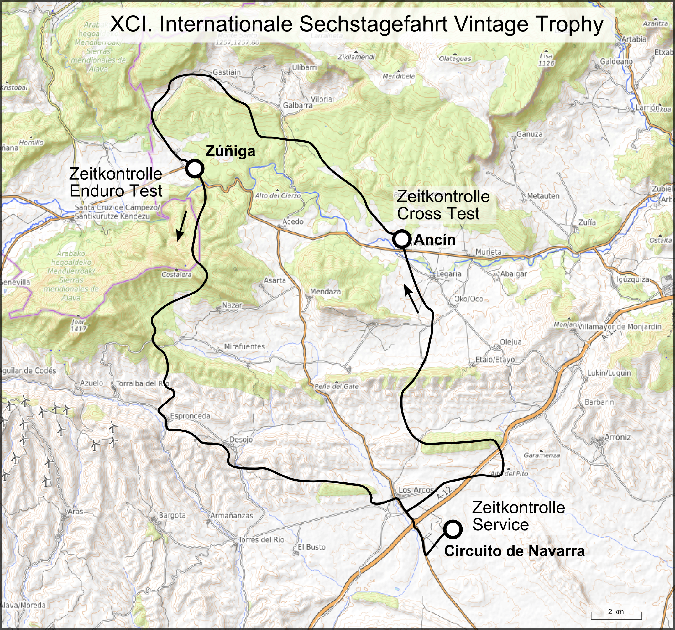 Karte der 91. Internationale Sechstagefahrt, Route der Vintage Trophy